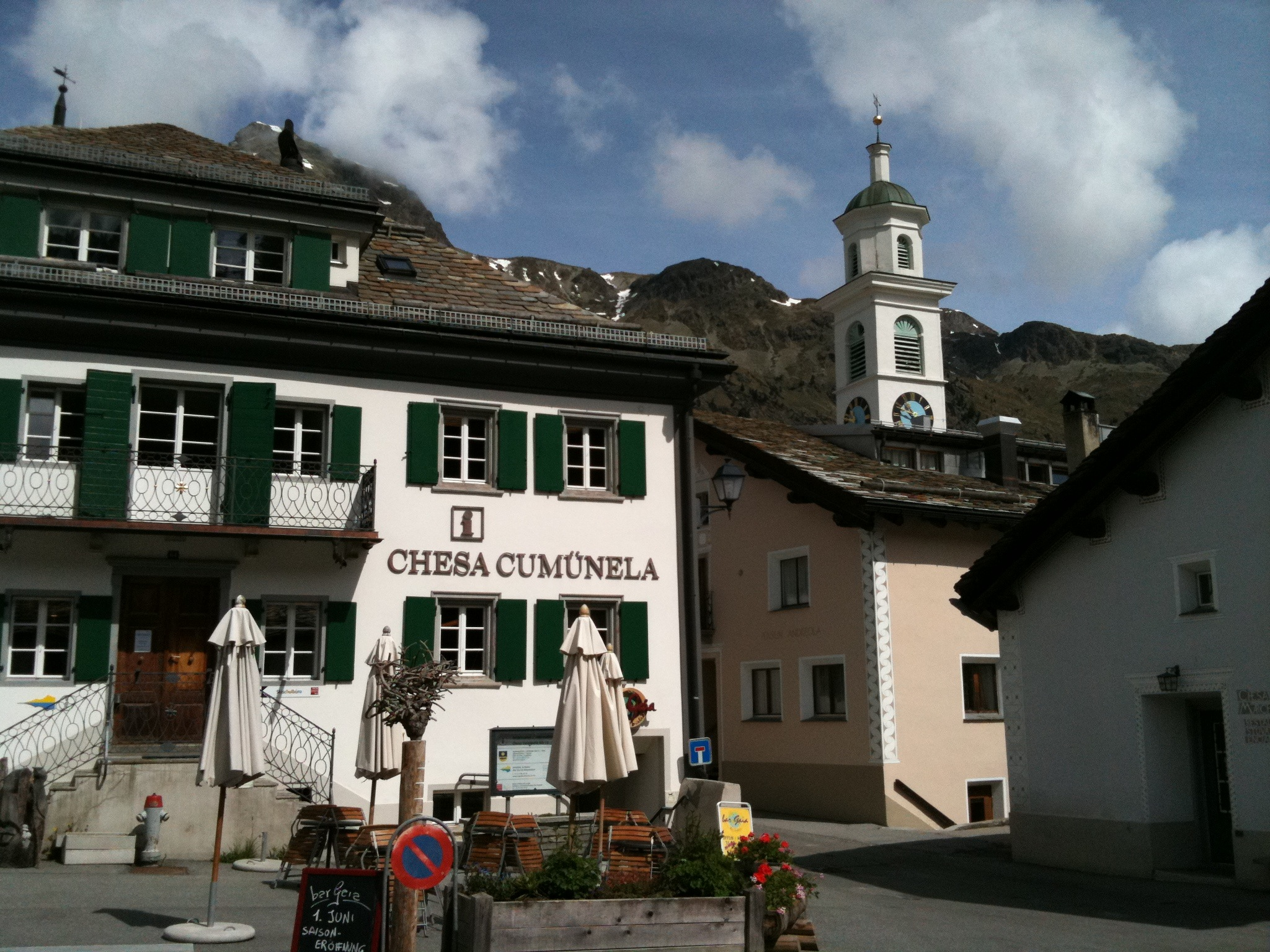 Sils im Engadin, Dorfteil Sils-Maria